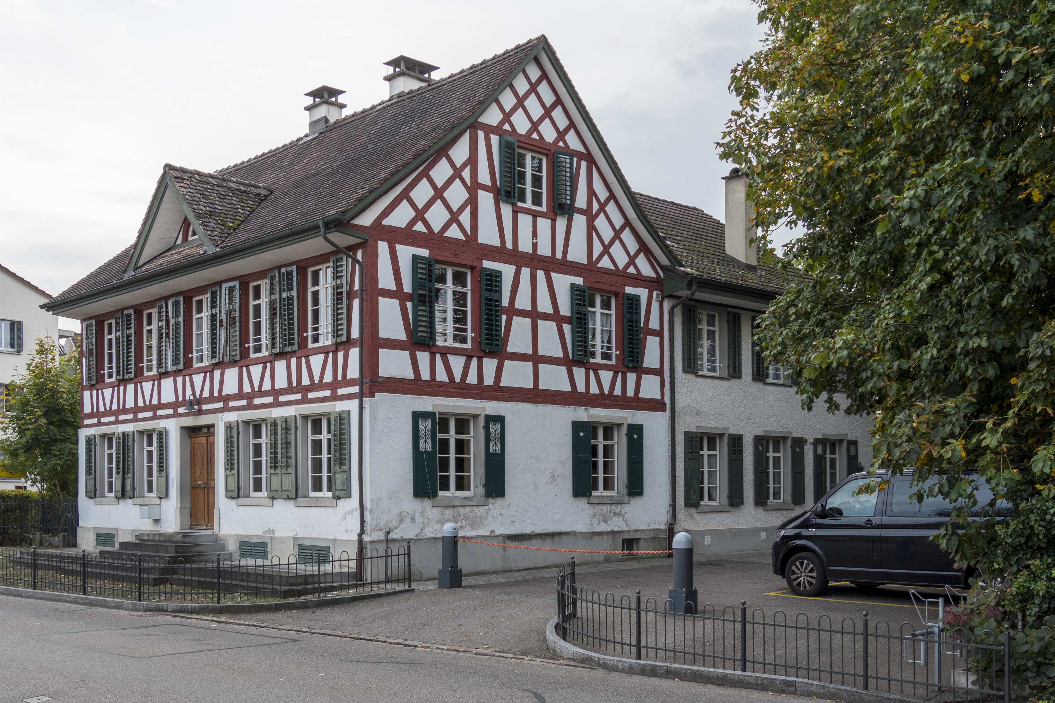 Frauenfeld, Walzmühlestrasse 16: 1846 erbautes Wohnhaus, auch als Kranken- und Armenhaus genutzt dient es heute als "Cevihuus".